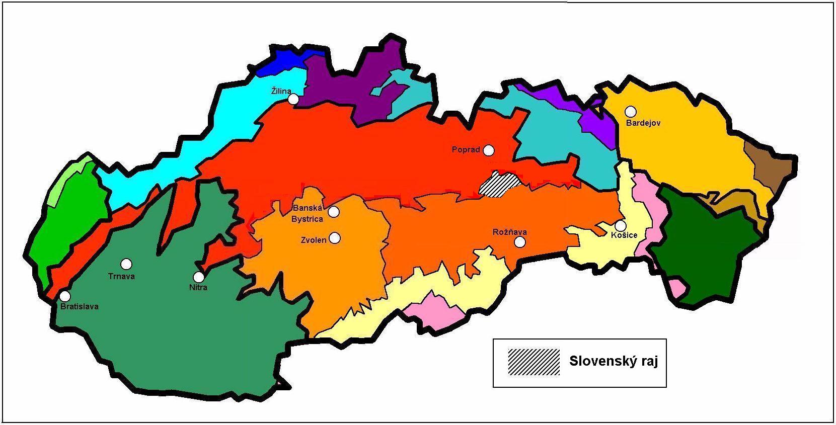 Slovenský raj